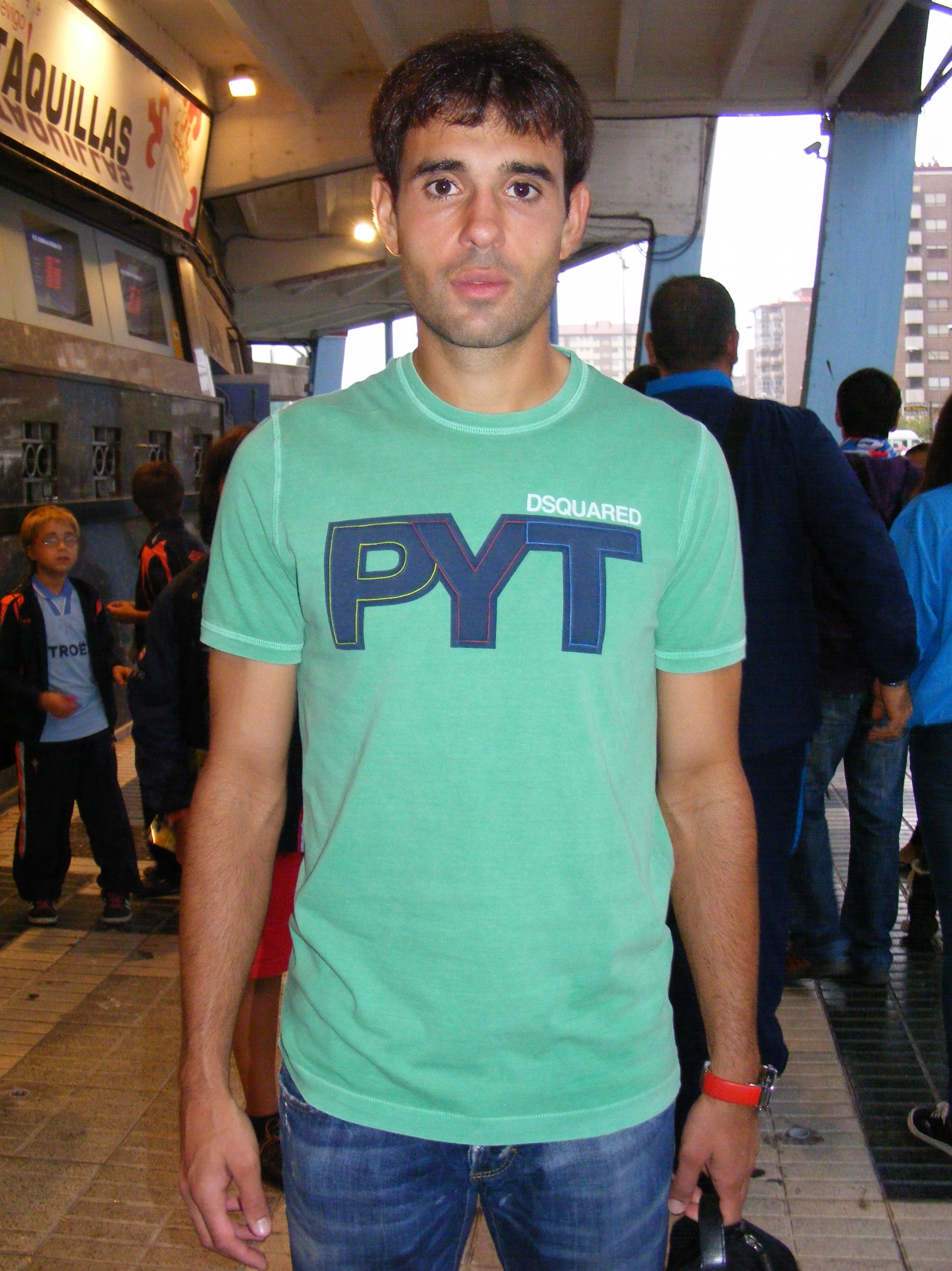 Borja Oubiña después del partido Celta-Elche